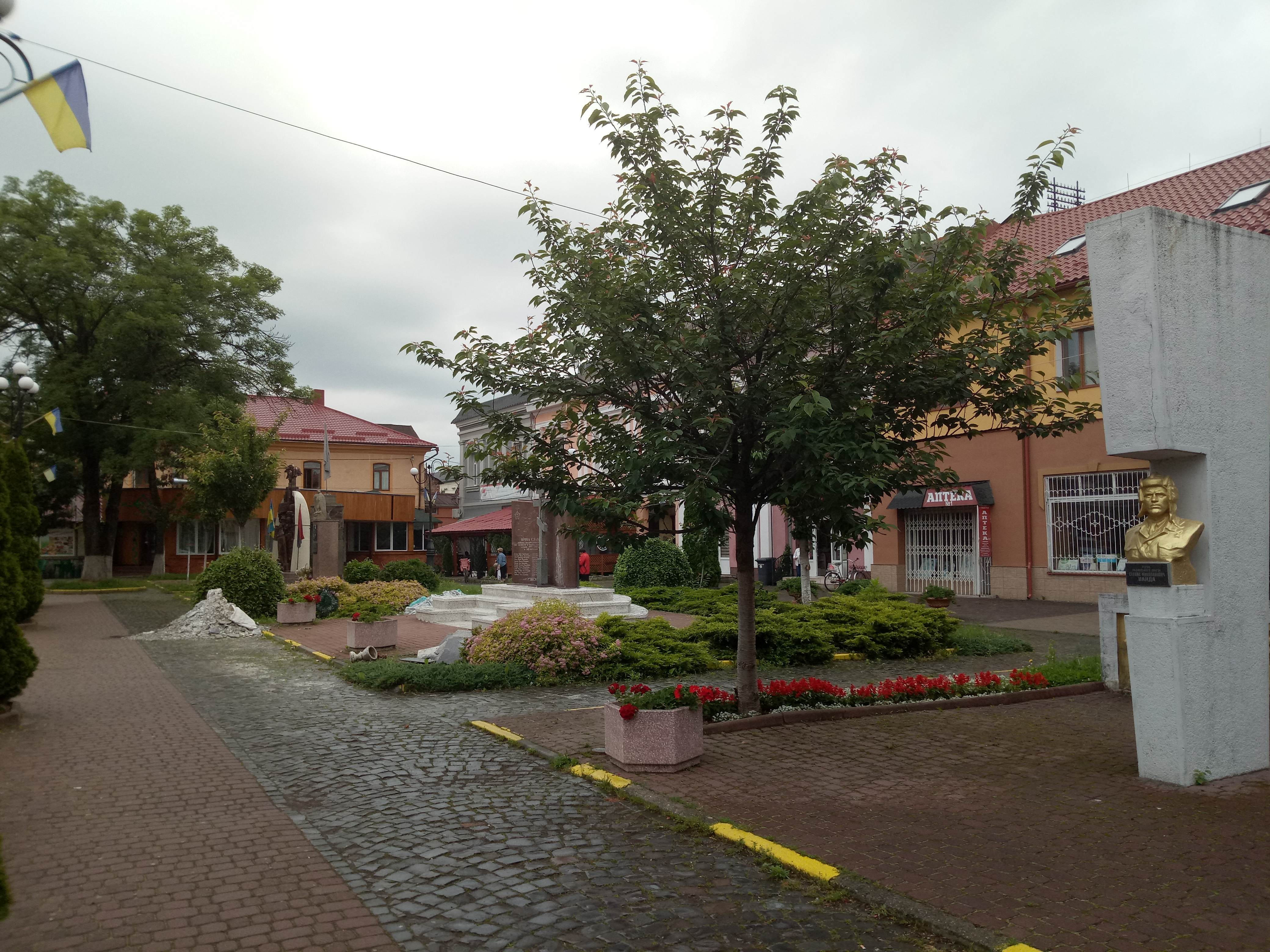 фото алеї пам'ятників в м. Тячів